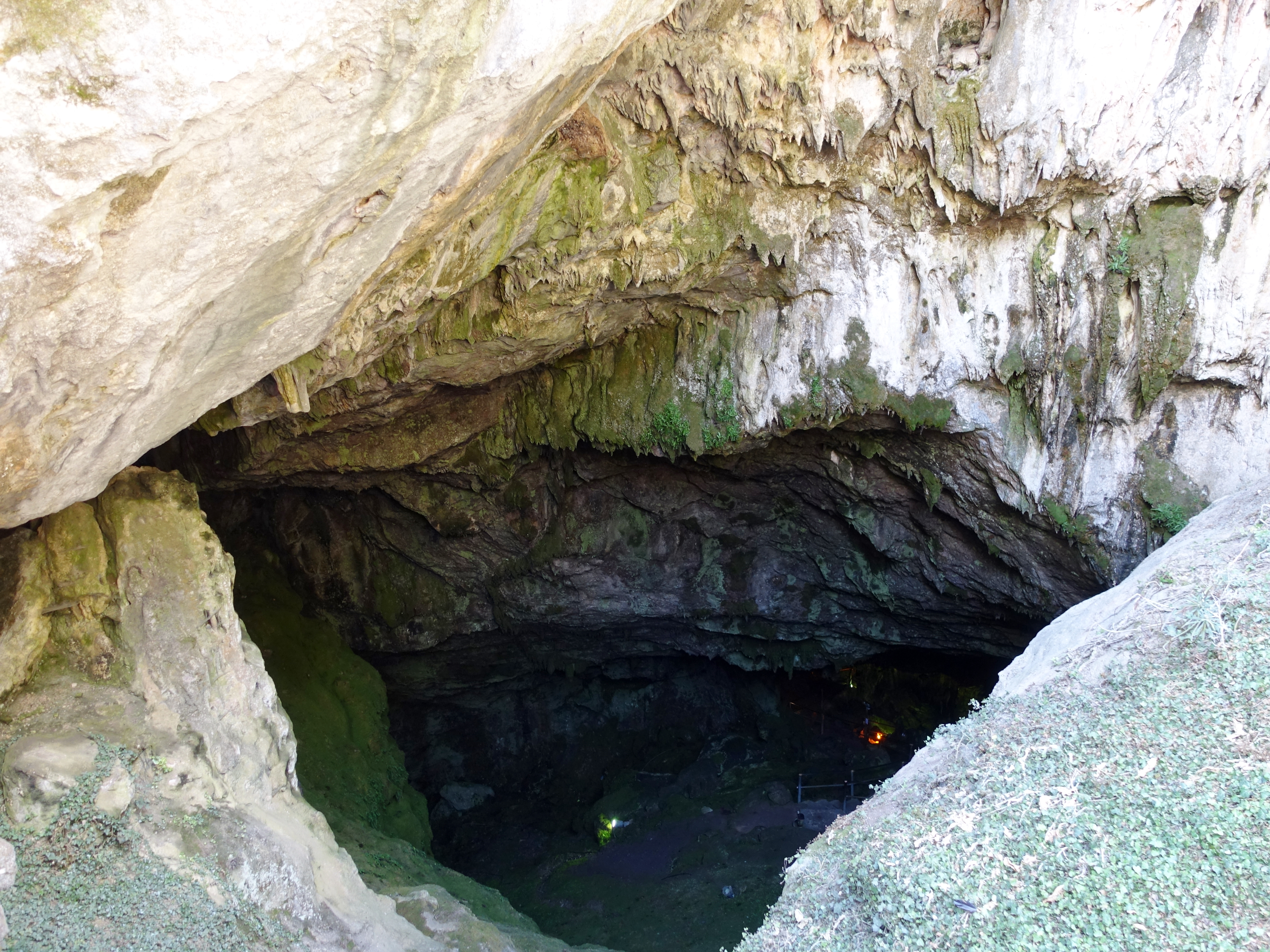 Diktäische Grotte (Δικταίον Αντρον) bei Psychro (Ψυχρό), Regionalbezirk Lassithi, Kreta, Griechenland